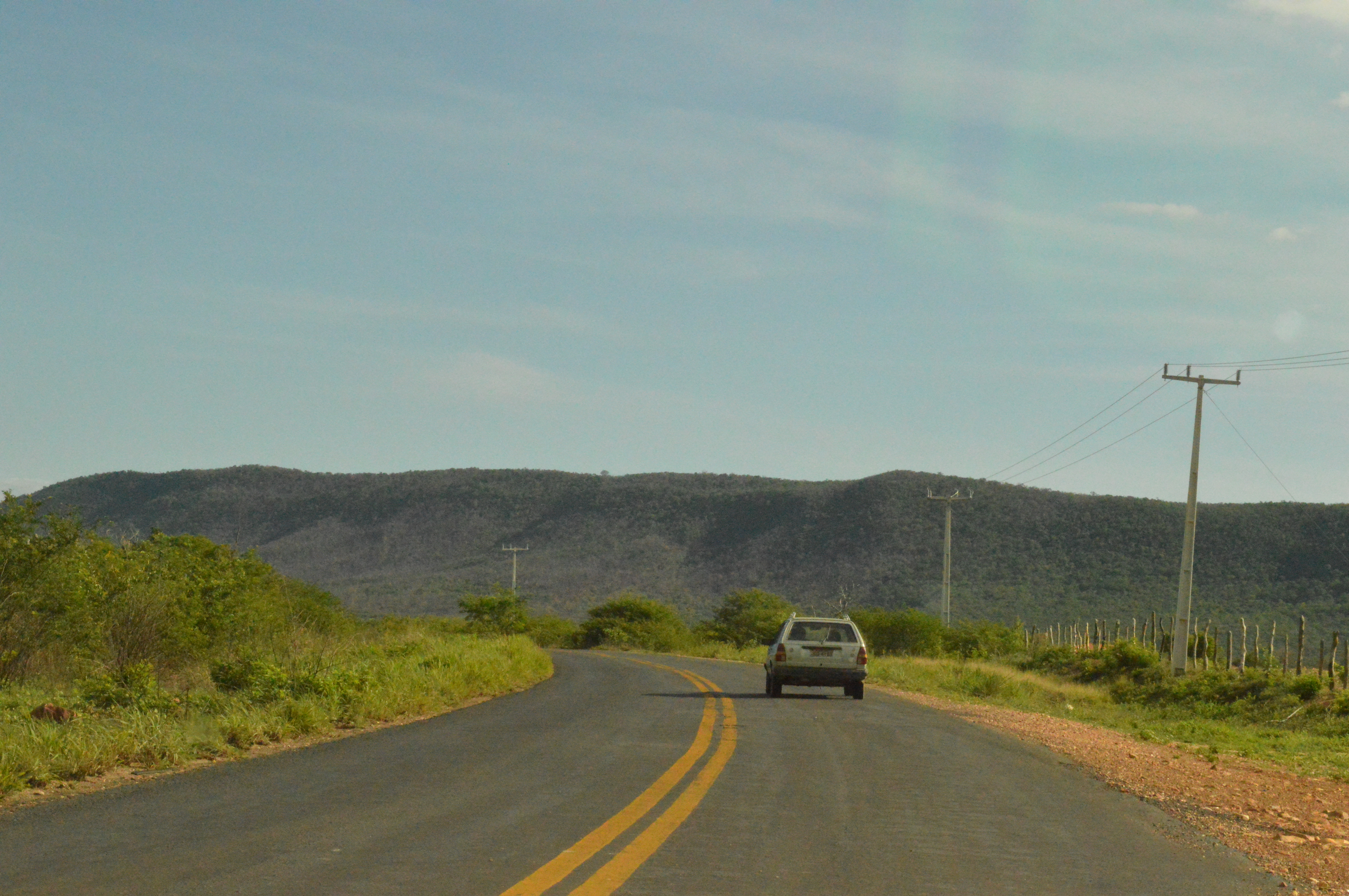 Vista da rodovia BA-160 em Paratinga, em direção à Ibotirama. Foto de 18 de janeiro de 2017.